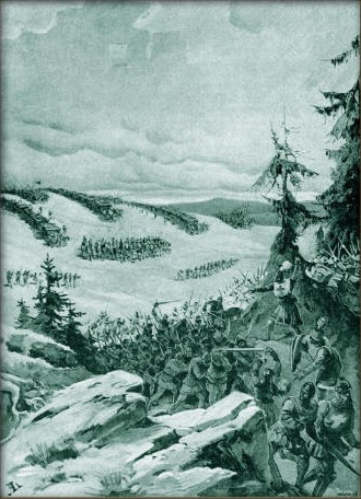 Adolf Liebscher - Křižáci u Domažlic utíkají před blížícími se Husity